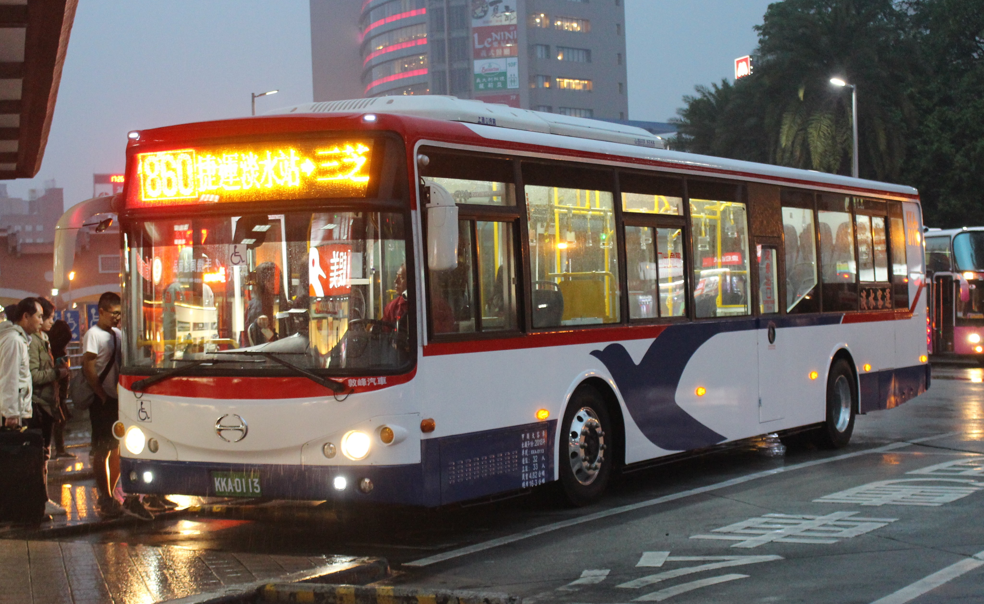 淡水客運 敦峰汽車HINO低地板公車 KKA-0113 860駕側